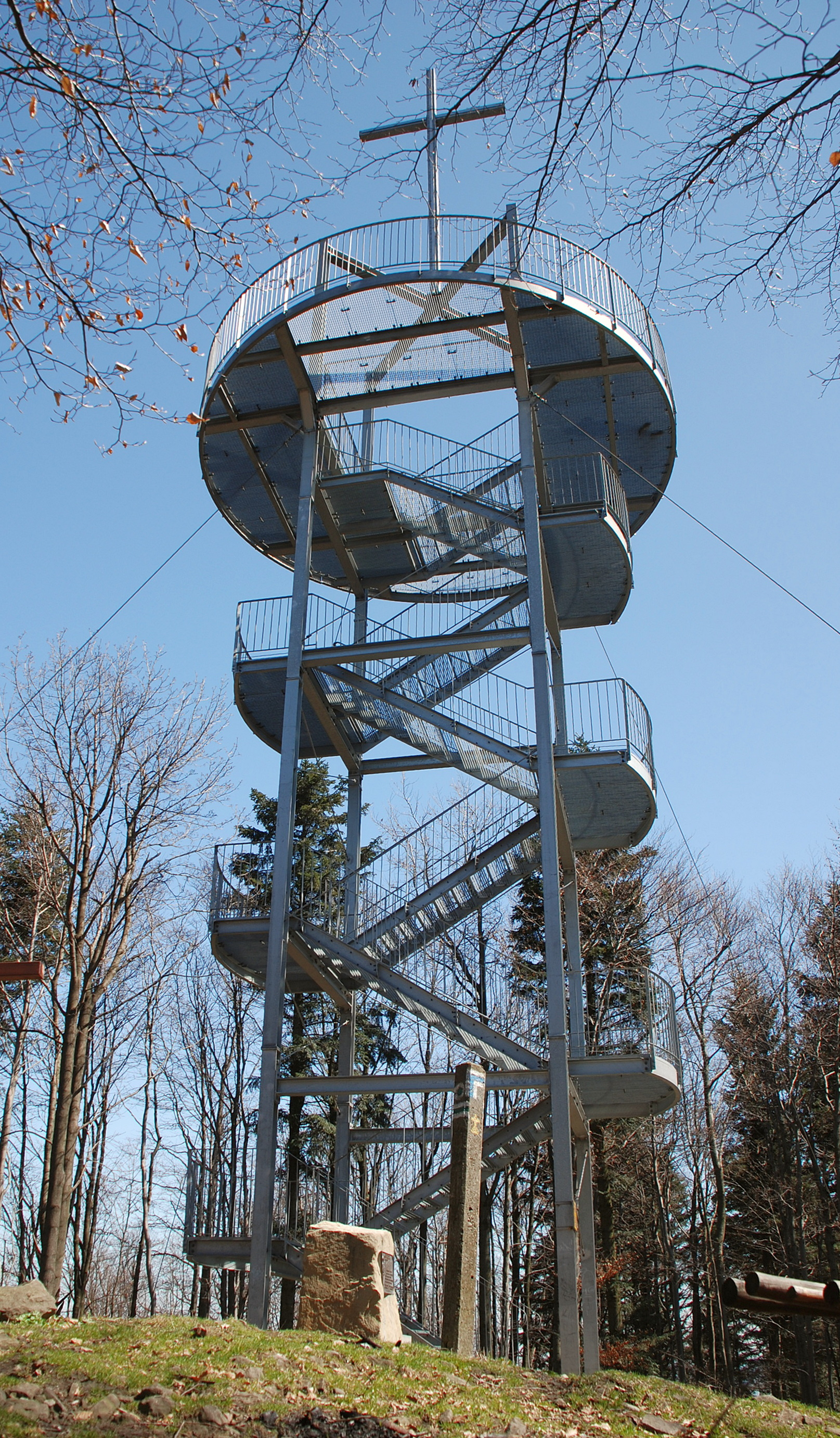 wsie Bogusza i Ptaszkowa